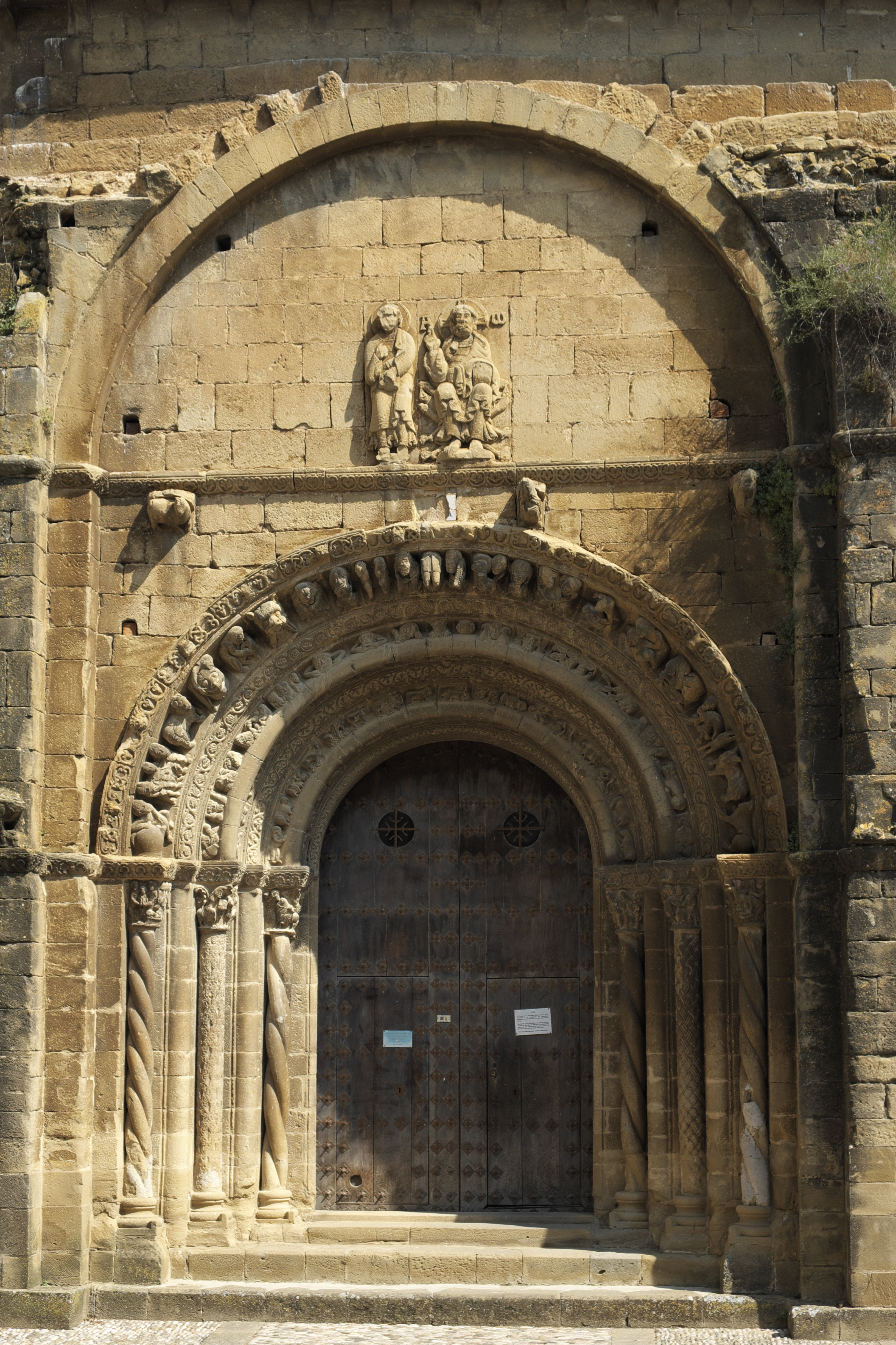 Katholische Pfarrkirche Santa María la Mayor in Uncastillo in der Provinz Saragossa (Aragón/Spanien), Südportal